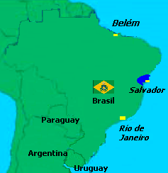 Sabinada (revuelta en Salvador, Bahía, 1837)